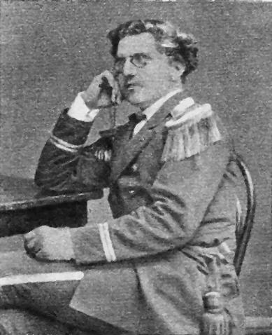 porucznik marynarki 2 klasy Mieczysław Pietruski